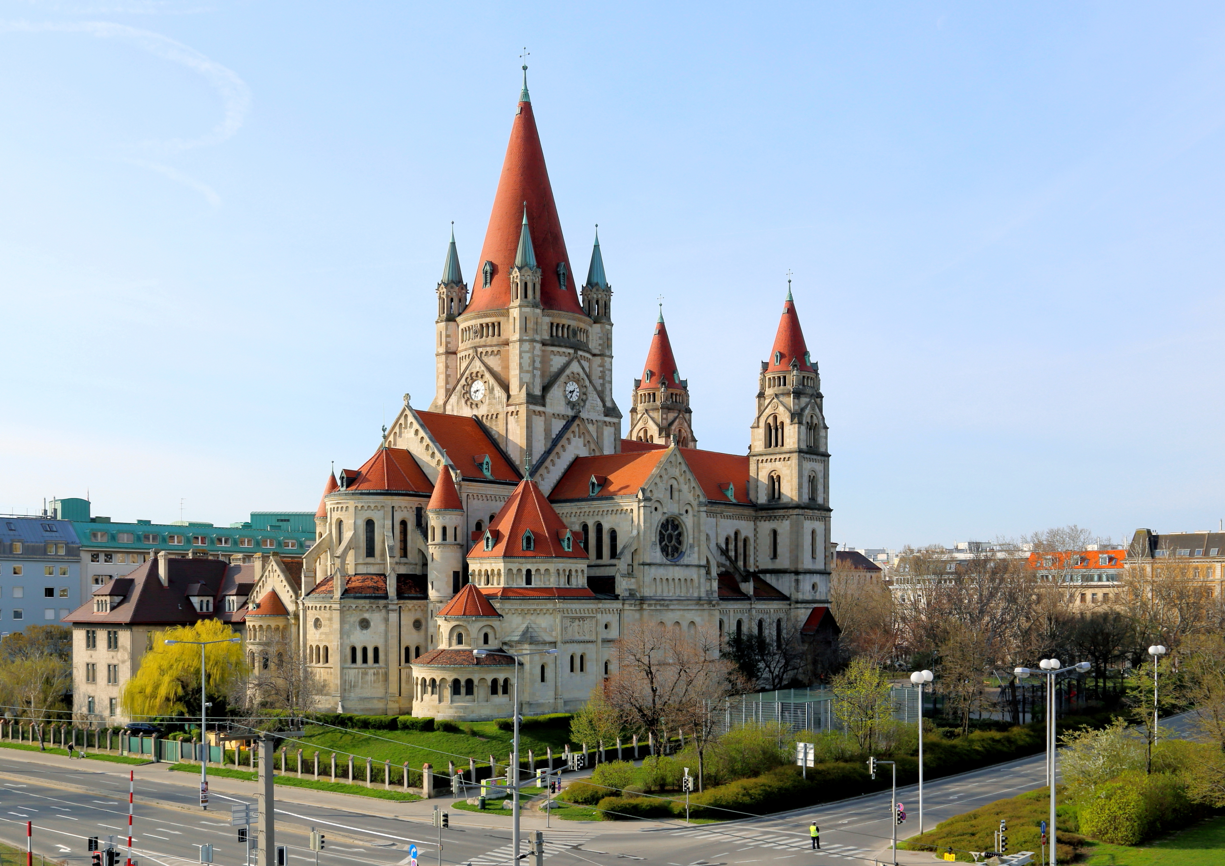 Nordansicht der Mexikokirche, auch als Franz-von-Assisi-Kirche bzw. Kaiser-Jubiläums-Kirche bezeichnet, am Mexikoplatz im 2. Wiener Gemeindebezirk Leopoldstadt. Die Kirche wurde nach Plänen des Architekten Victor Luntz errichtet und 1913 geweiht.